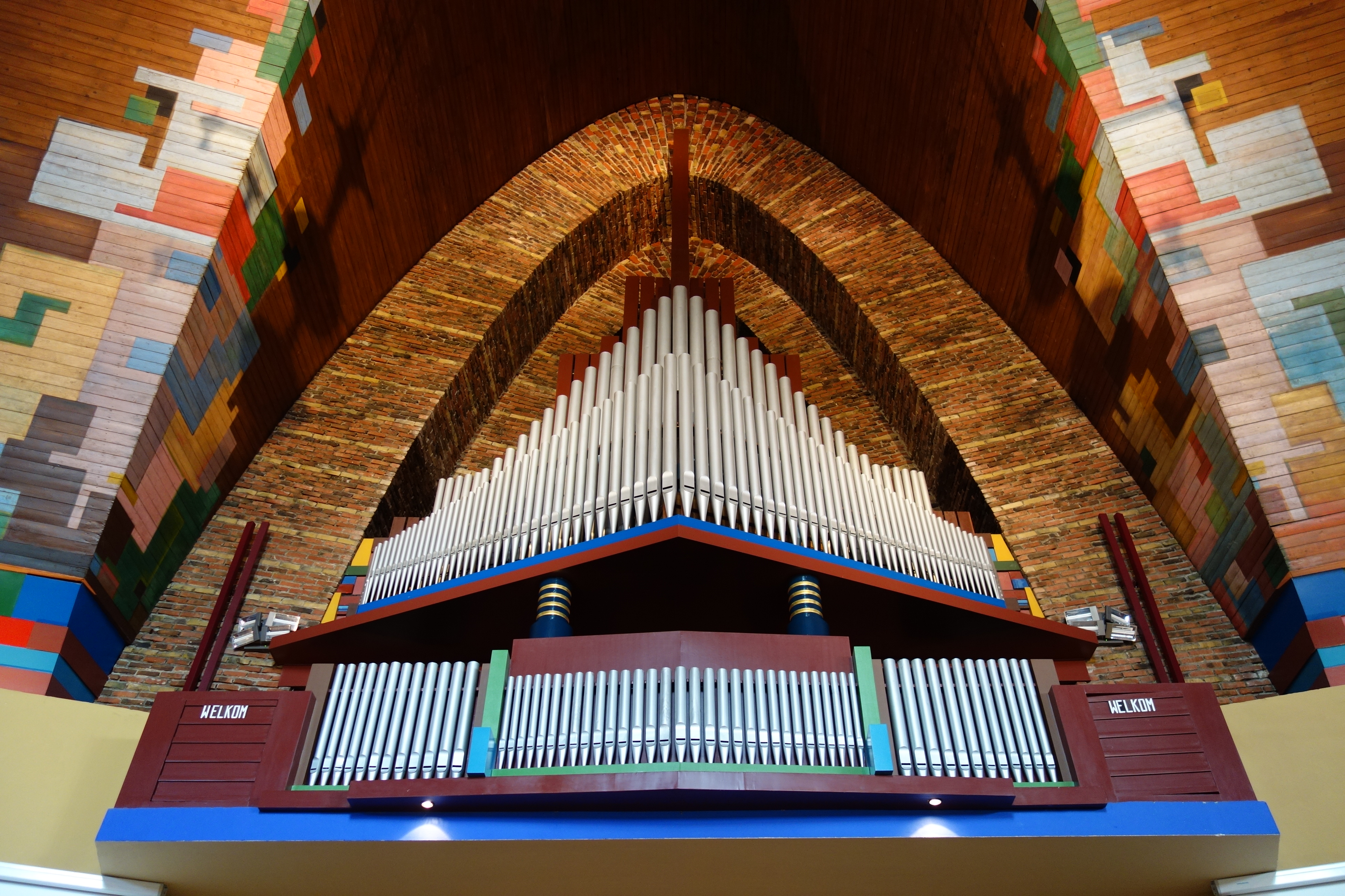 Orgel in de gereformeerde kerk van Andijk. De kleuren aan weerszijden van het orgel zijn teruggebracht.